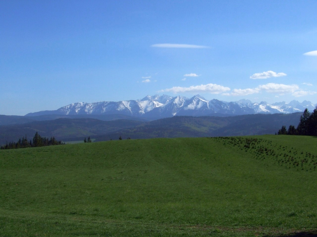 Widok z Pienin Spiskich (Wapienne) na Tatry i Zamagurze Spiskie